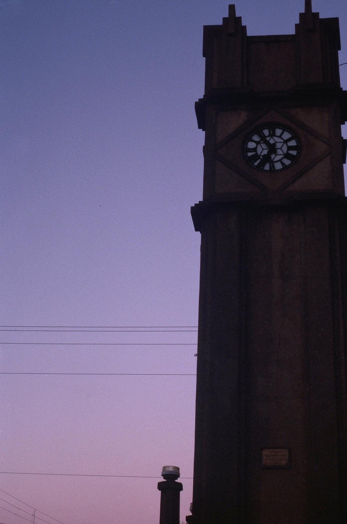 Relogio Central de Tres Lagoas, Mato Grosso do Sul, Brasil